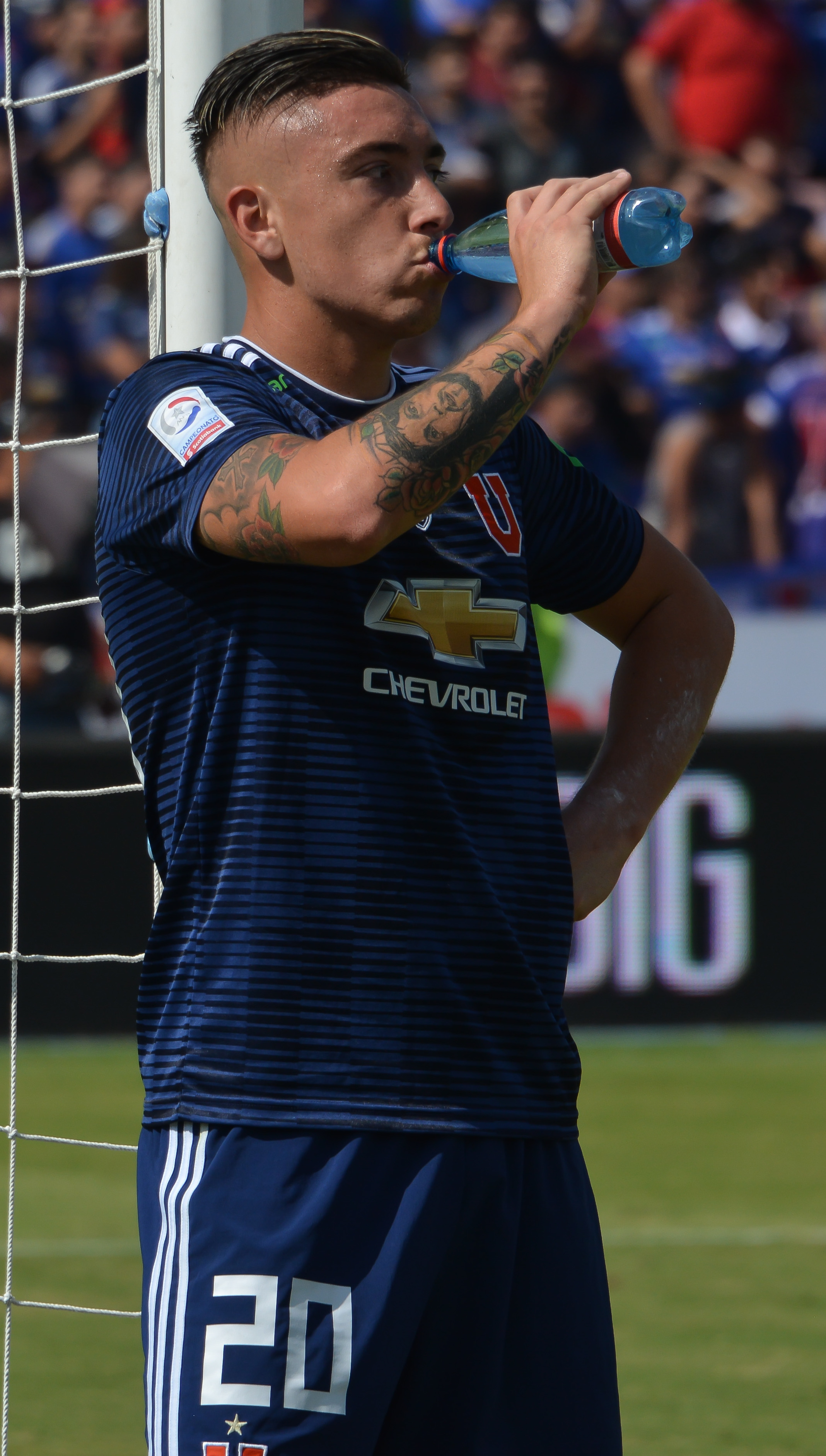 Universidad de Chile v Colo-Colo, Estadio Nacional, Santiago, Chile.